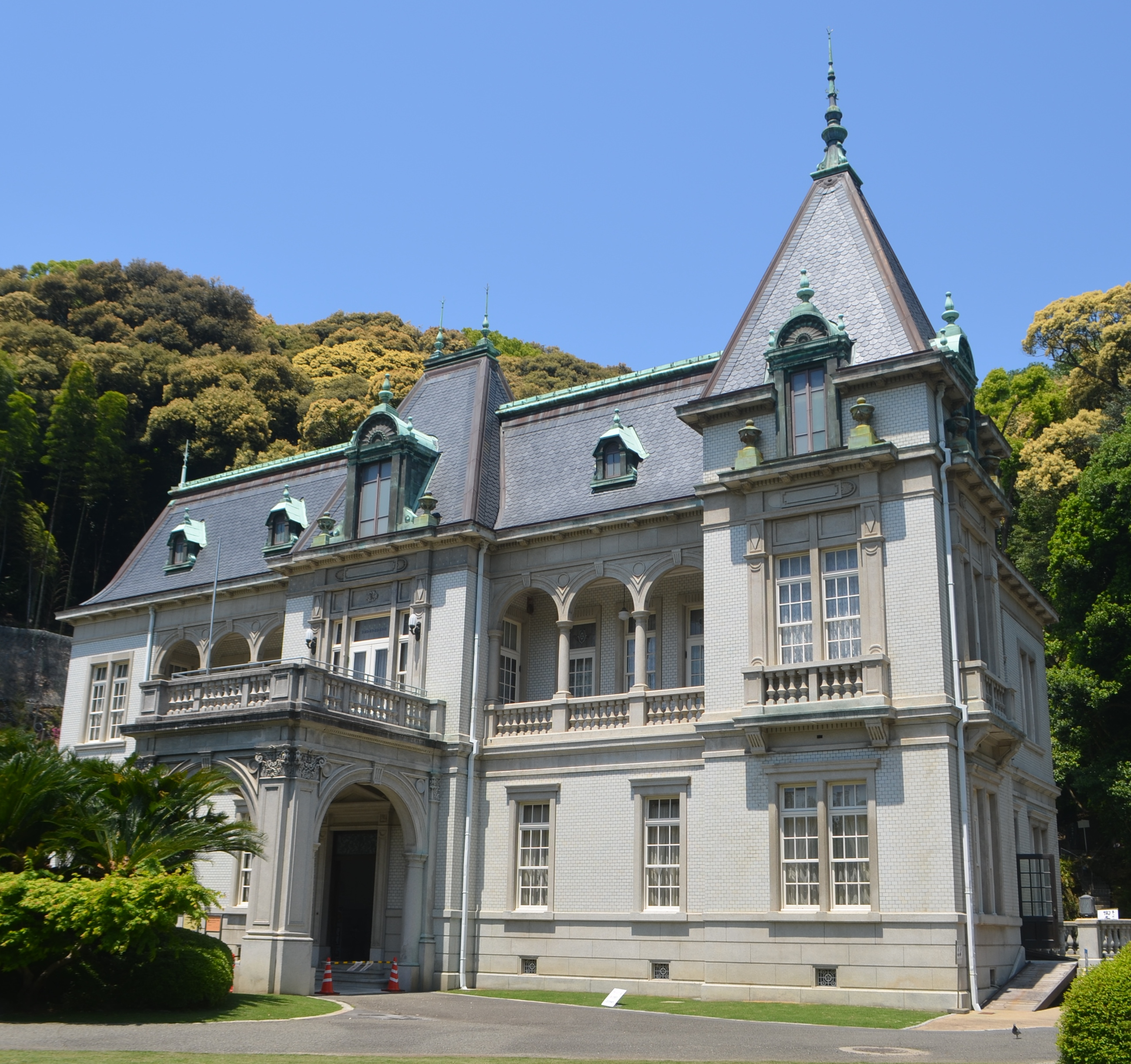 萬翠荘の外観。